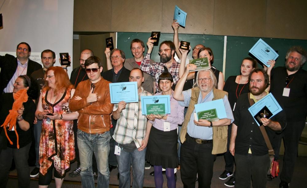 Dobitnici nagrade SFERA na konvenciji Kontakt, koja spaja 34. SFeraKon i 34. Eurocon u Zagrebu